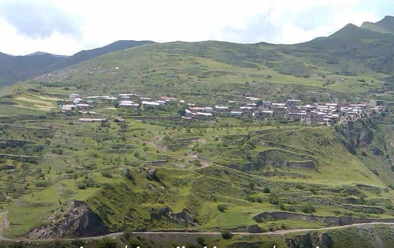 село Гунух. Чародинский район Дагестана